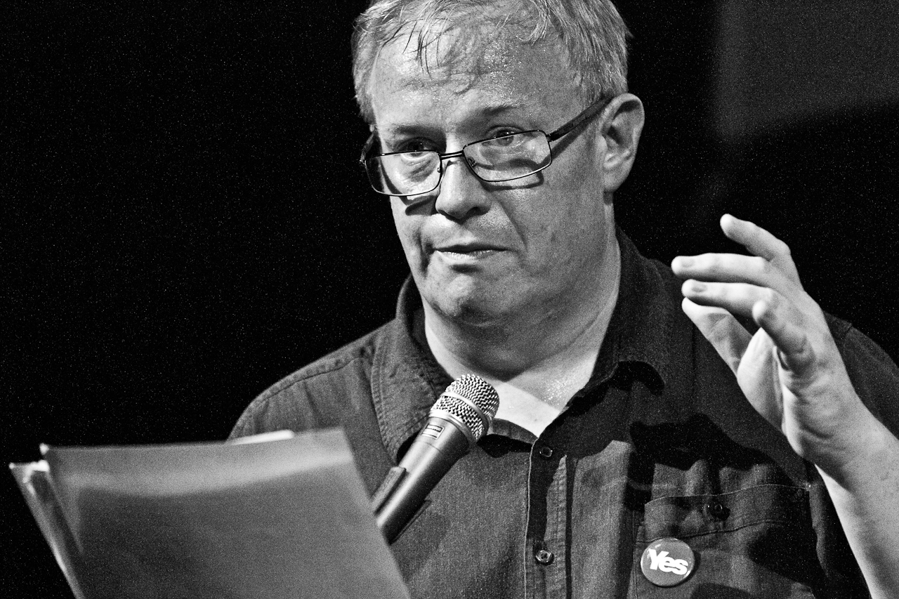 MAČ 2014